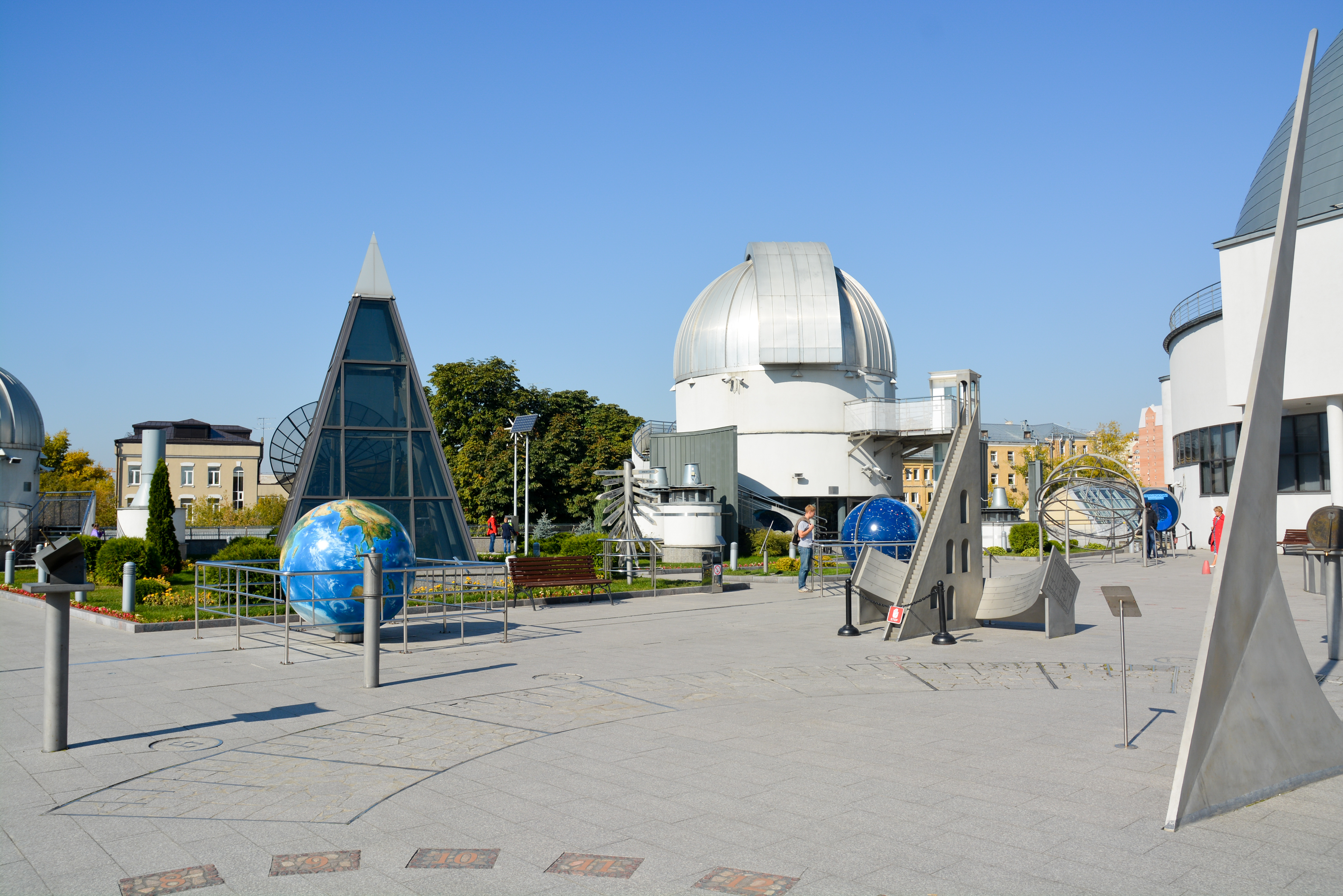 «Парк неба» в Московском планетарии